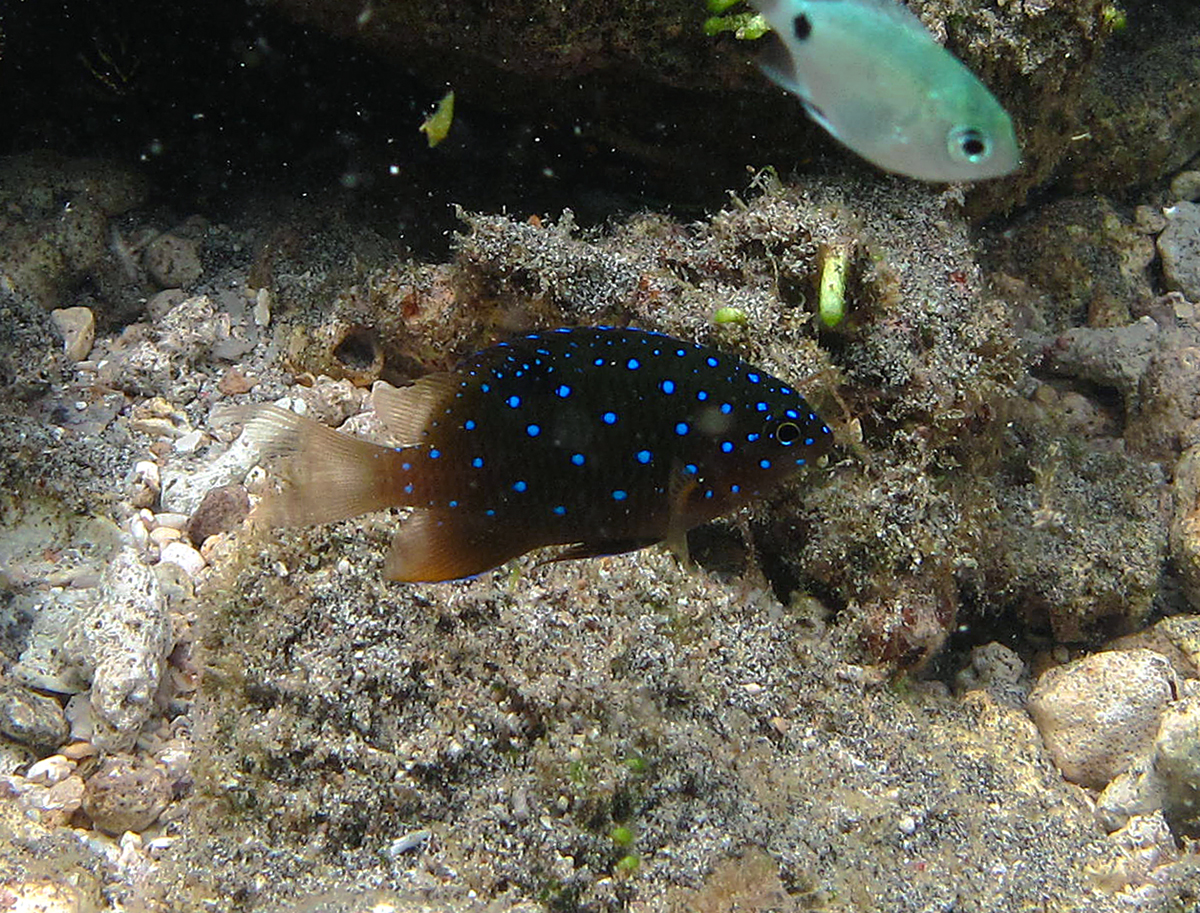 Une demoiselle à points bleus (Plectroglyphidodon lacrymatus) juvénile à la Réunion.